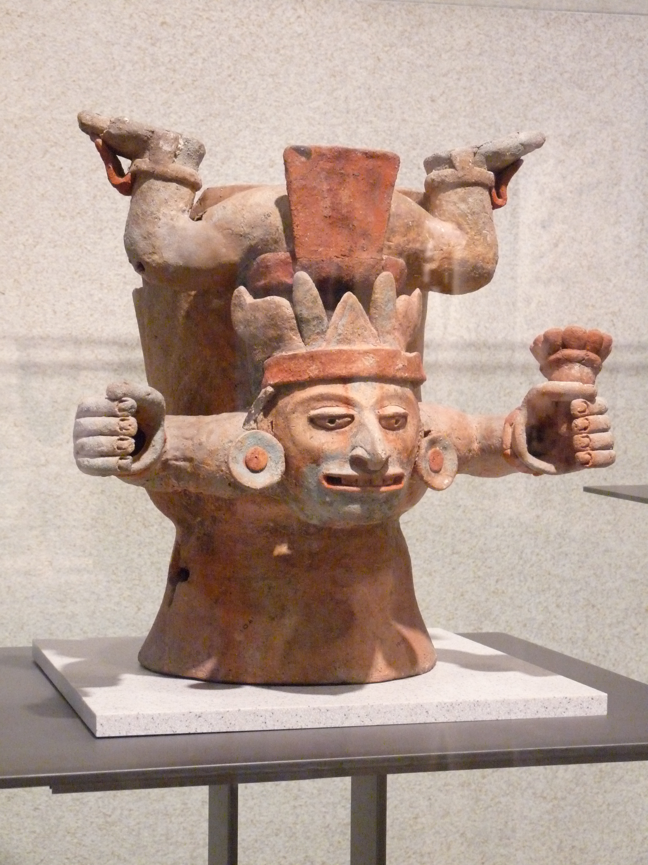 Vasija ceremonial policromada procedente de Dzibanché, Quintana Roo (Museo Nacional de Antropología de México)